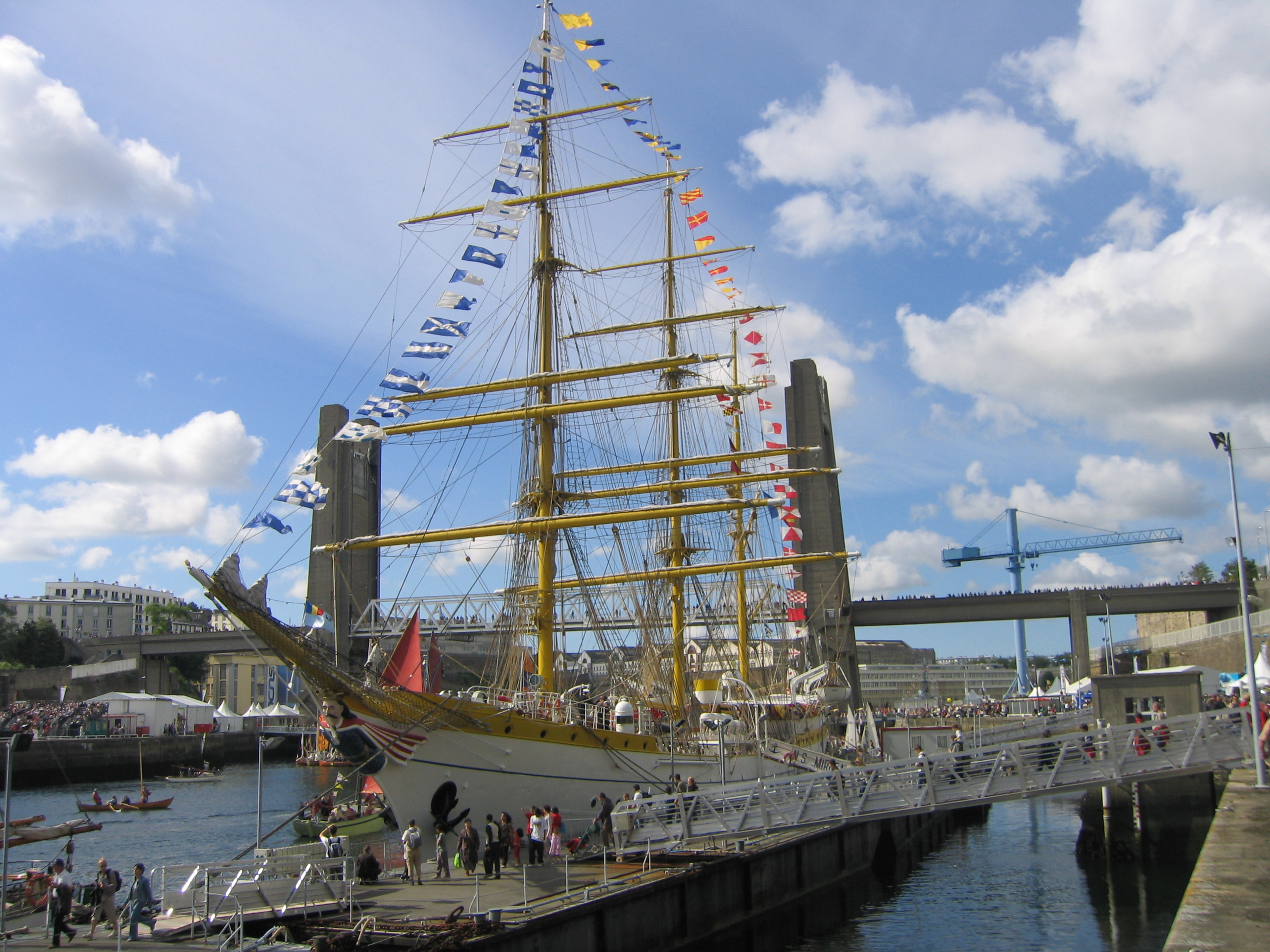 Lors de Brest 2008